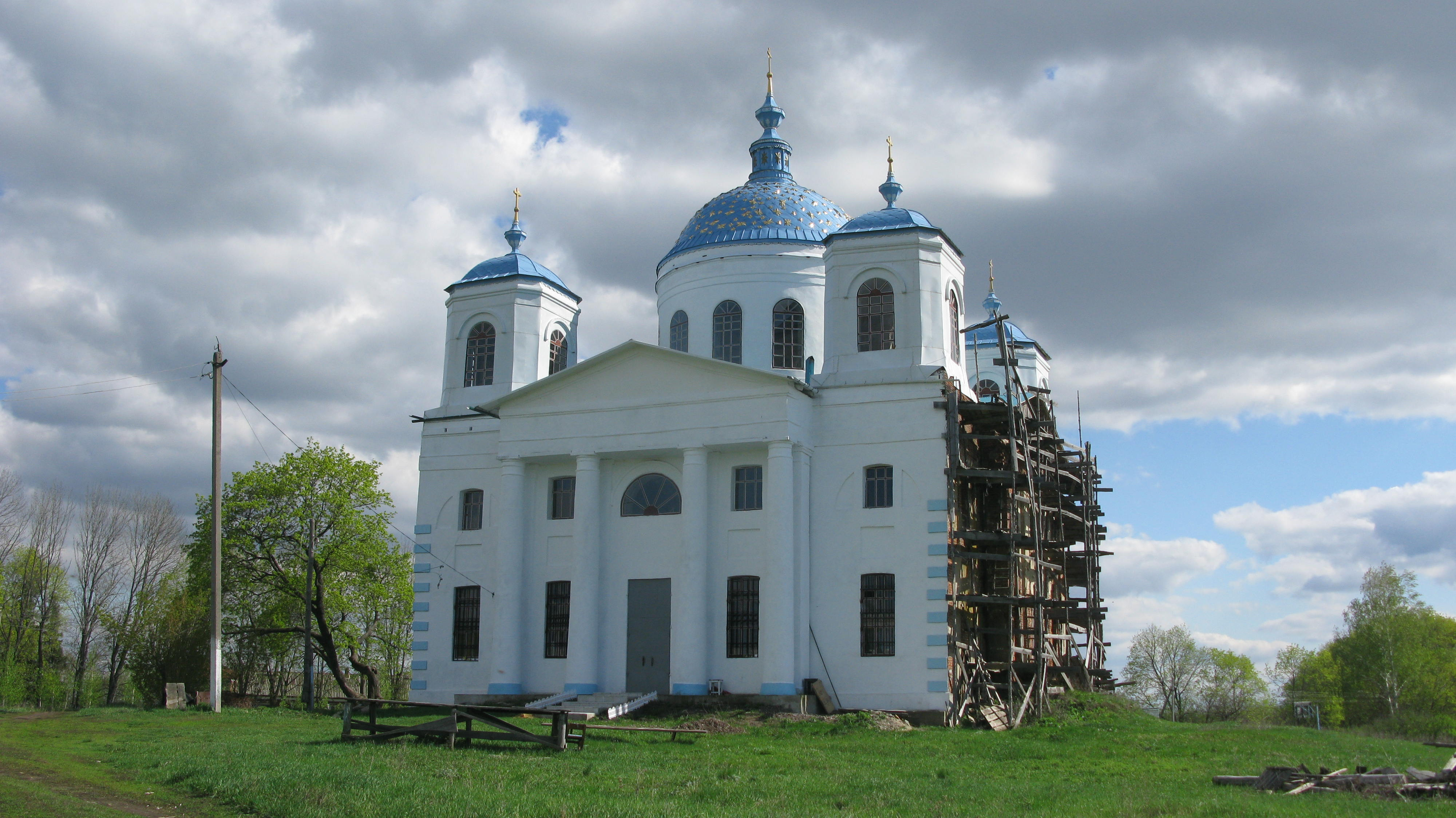 Никольский храм в Урусово